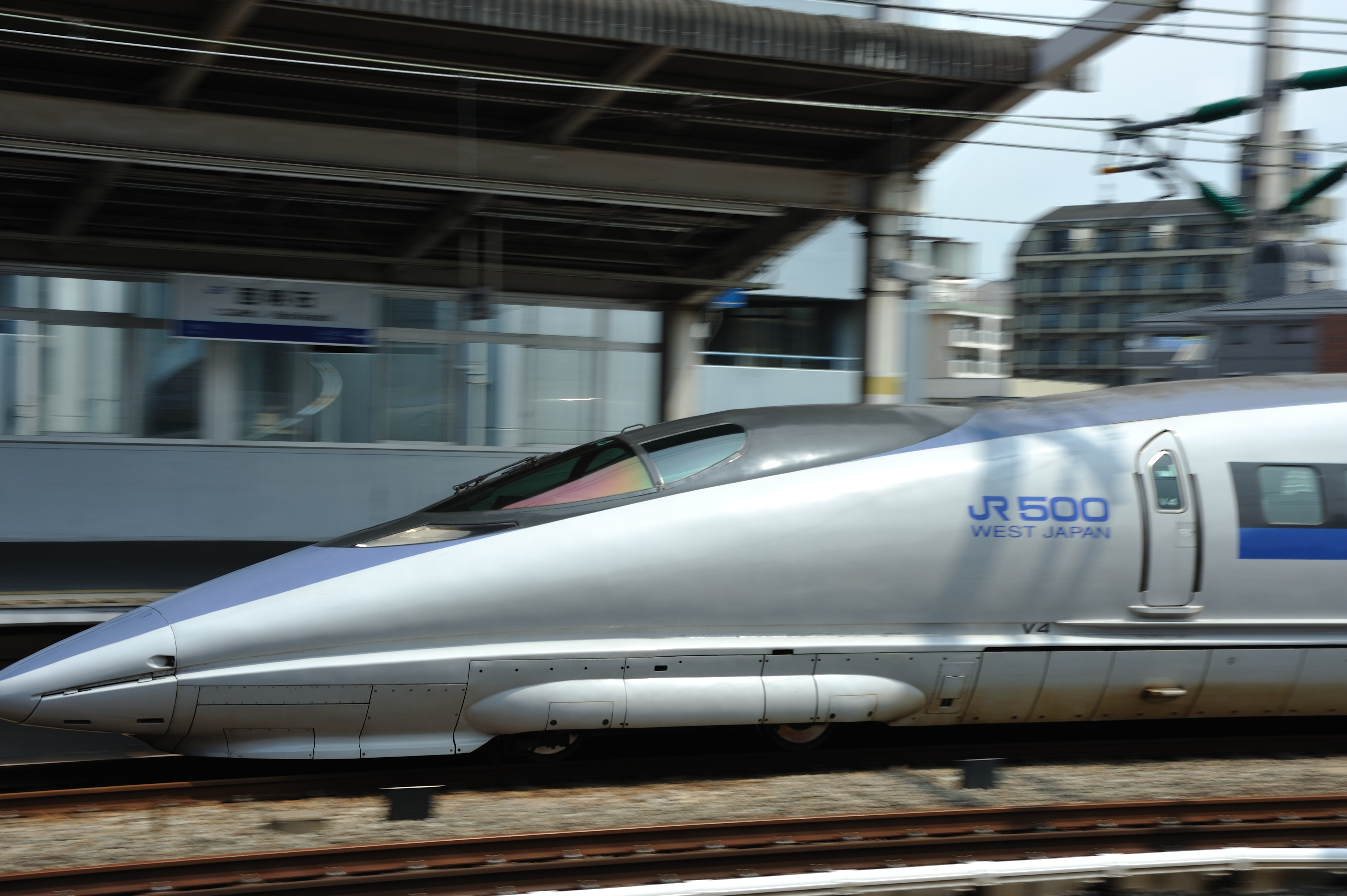 Nishi-Akashi